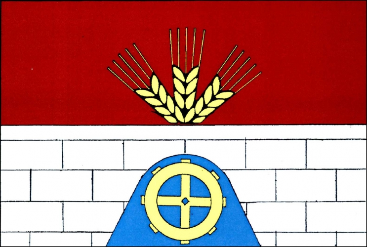 Vlajka, Oldřiš, okres Svitavy